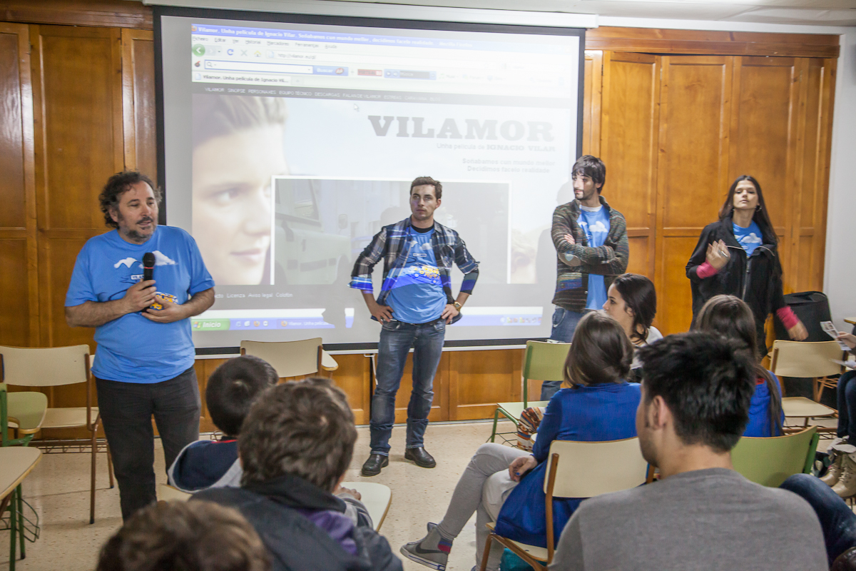 Vilamor (filme). Ignacio Vilar. Sabela Arán. Rubén Riós. Galiza